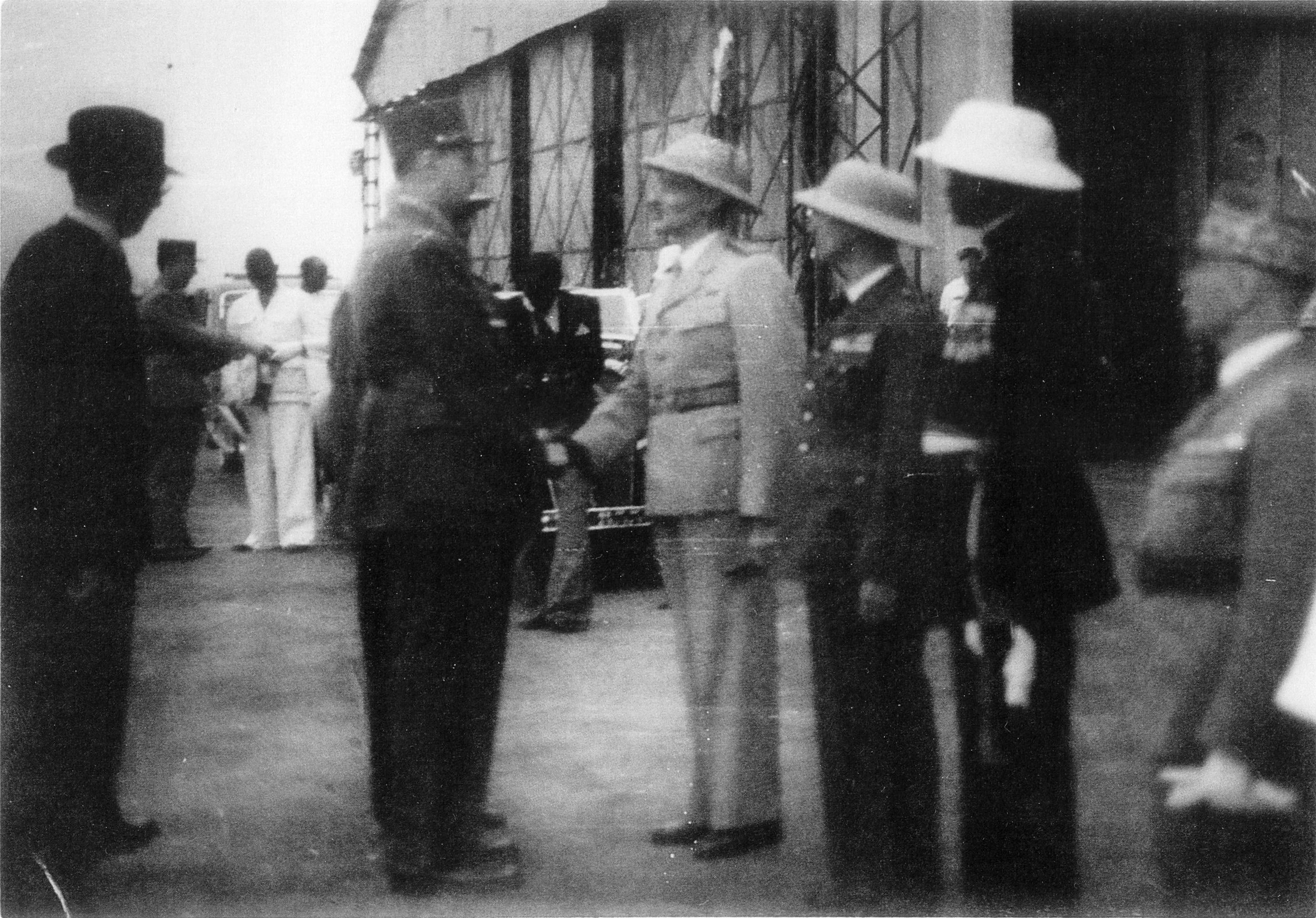 Le gouverneur général Léon Geismar accueillant le général de Gaulle à sa descente d'avion lors de sa première visite à Dakar. René Pleven se tient derrière le général en chapeau noir.